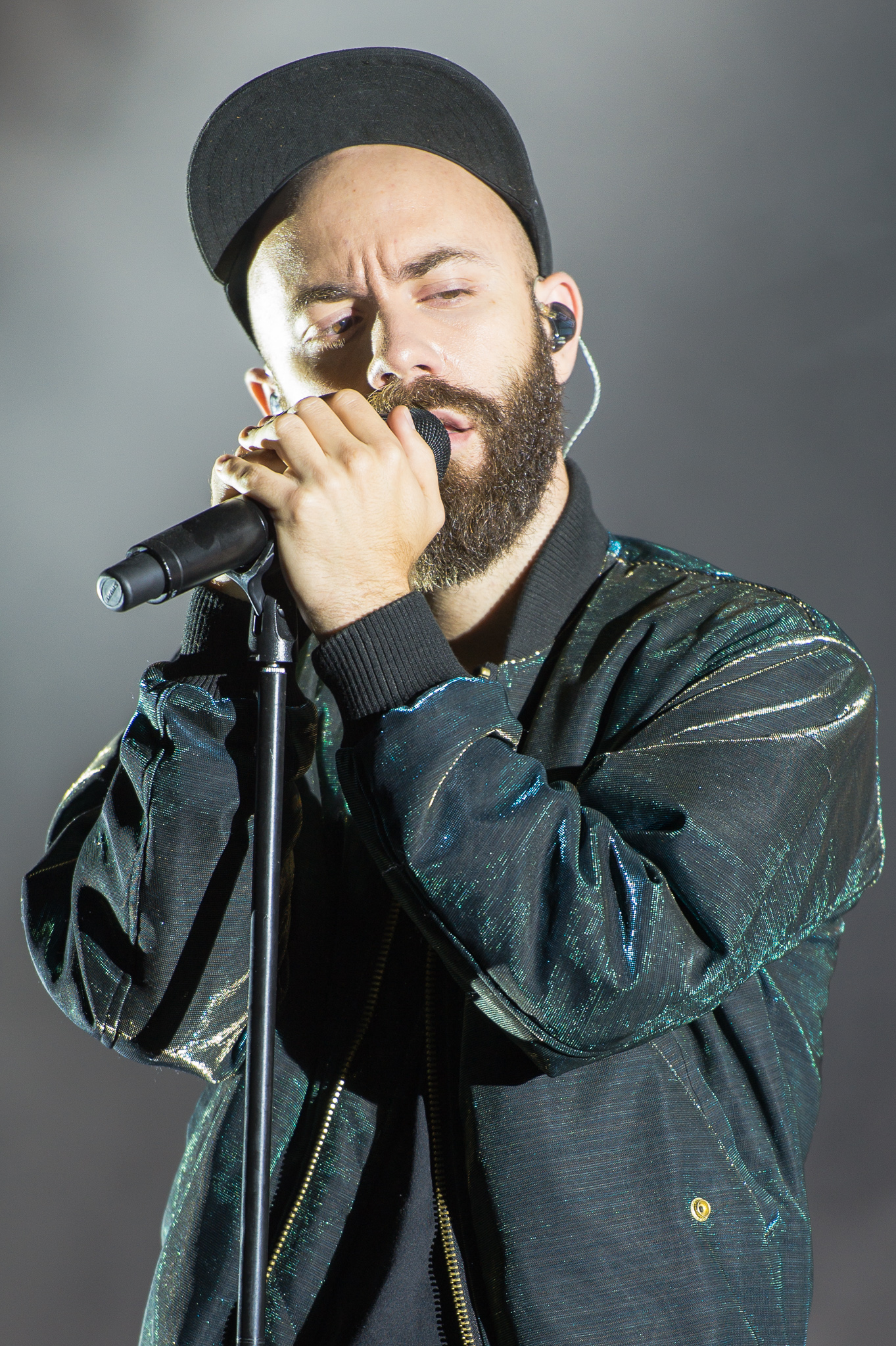 ARGO-Konzerte,Alternastage,Konzert,Livekonzert,Livemusik,Musik,RiP,Rock im Park 2014,Woodkid,Yoann Lemoine